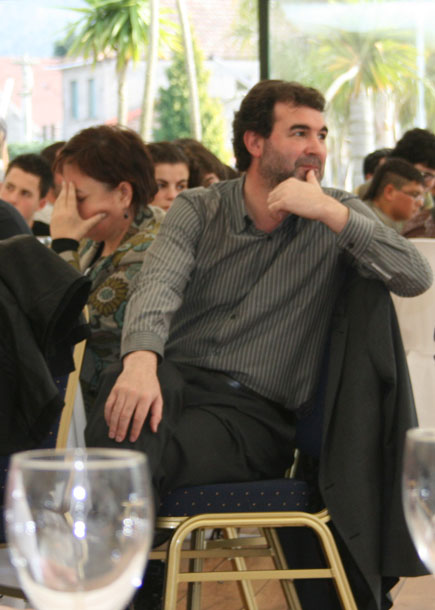 Quintana na comida con 650 mozos celebrada no restaurante Mochi de Pontevedra